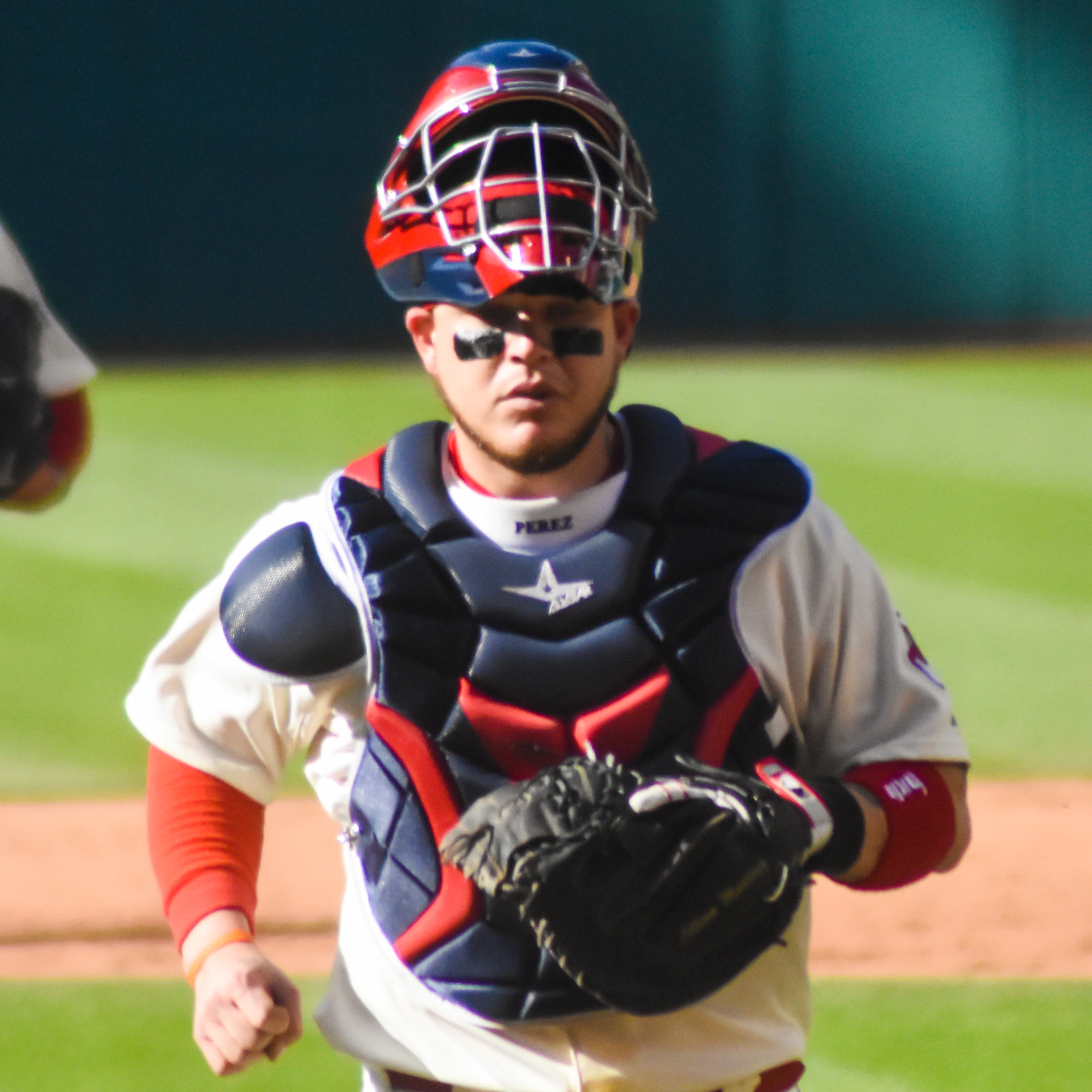 Roberto Pérez